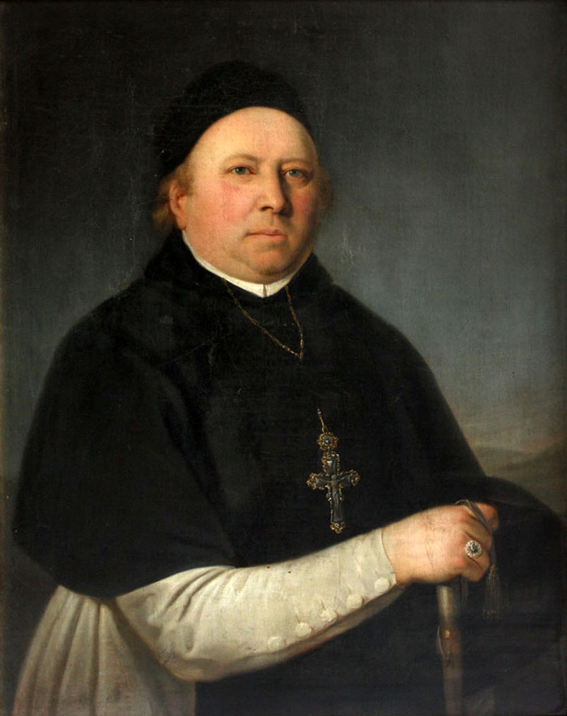 Sebastian Stöckl, 35. Abt von Stift Stams (1790–1819)